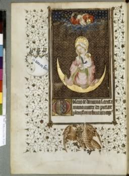 Maître de Rohan. Vierge à l'Enfant sur un croissant de lune.